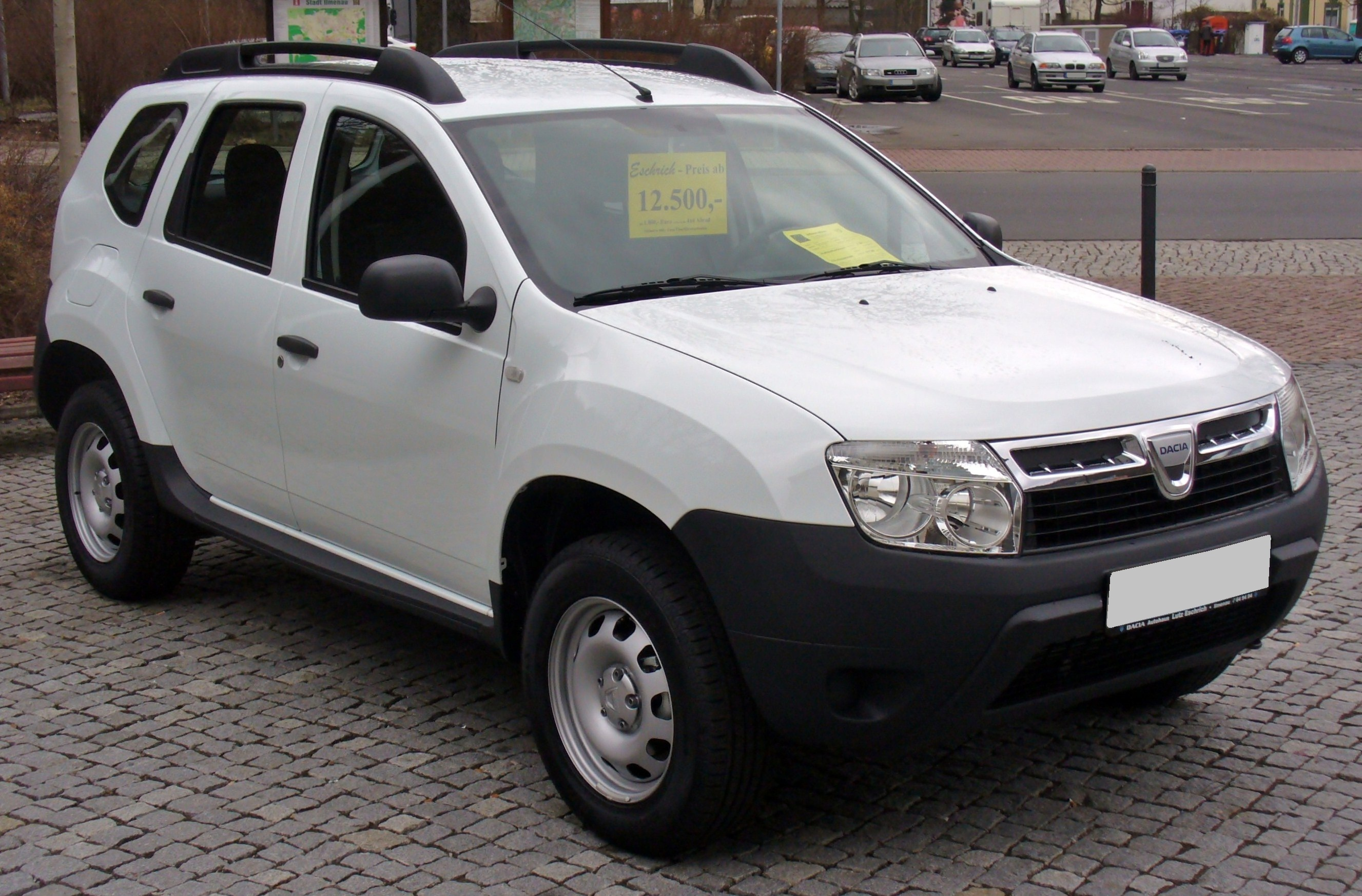 Dacia Duster